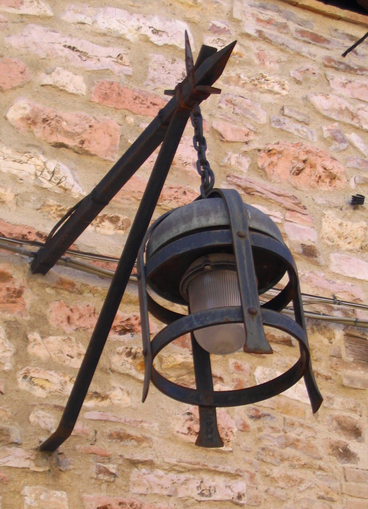 Crosse pour applique d'extérieur avec lanterne circulaire suspendue, Assise, Italie